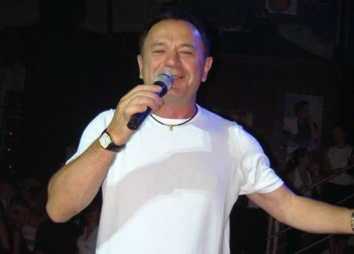 Mile Kitić